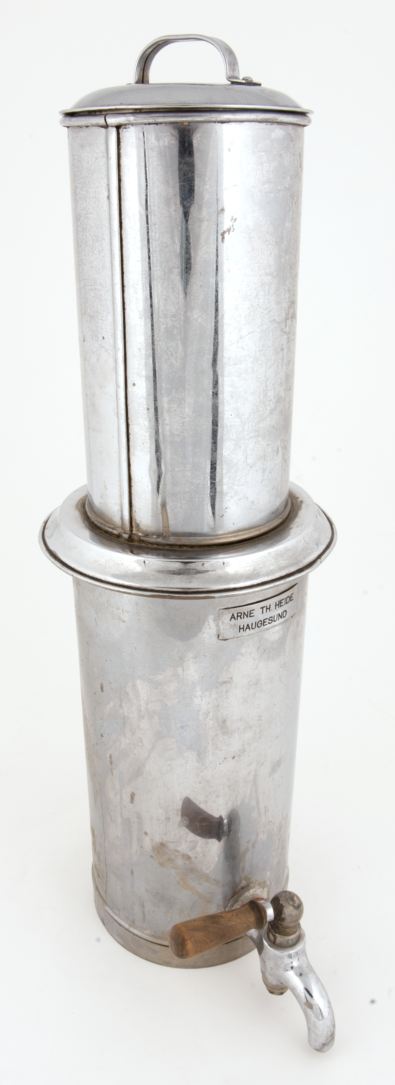 Seitzfilter, asbestfilter. Produsent: Arne Th. Heide. Påskrift : Arne Th. Heide Haugesund Brukssted: Ørje. Ørje apotek ble opprettet i 1922 og nedlagt i 1972. Sosialdepartementet overtok varebeholdningen og ga deler av den til museet.